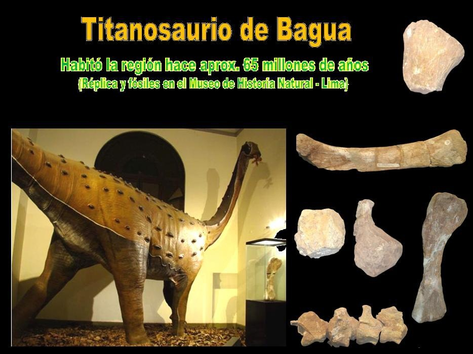 Paleontología de Bagua